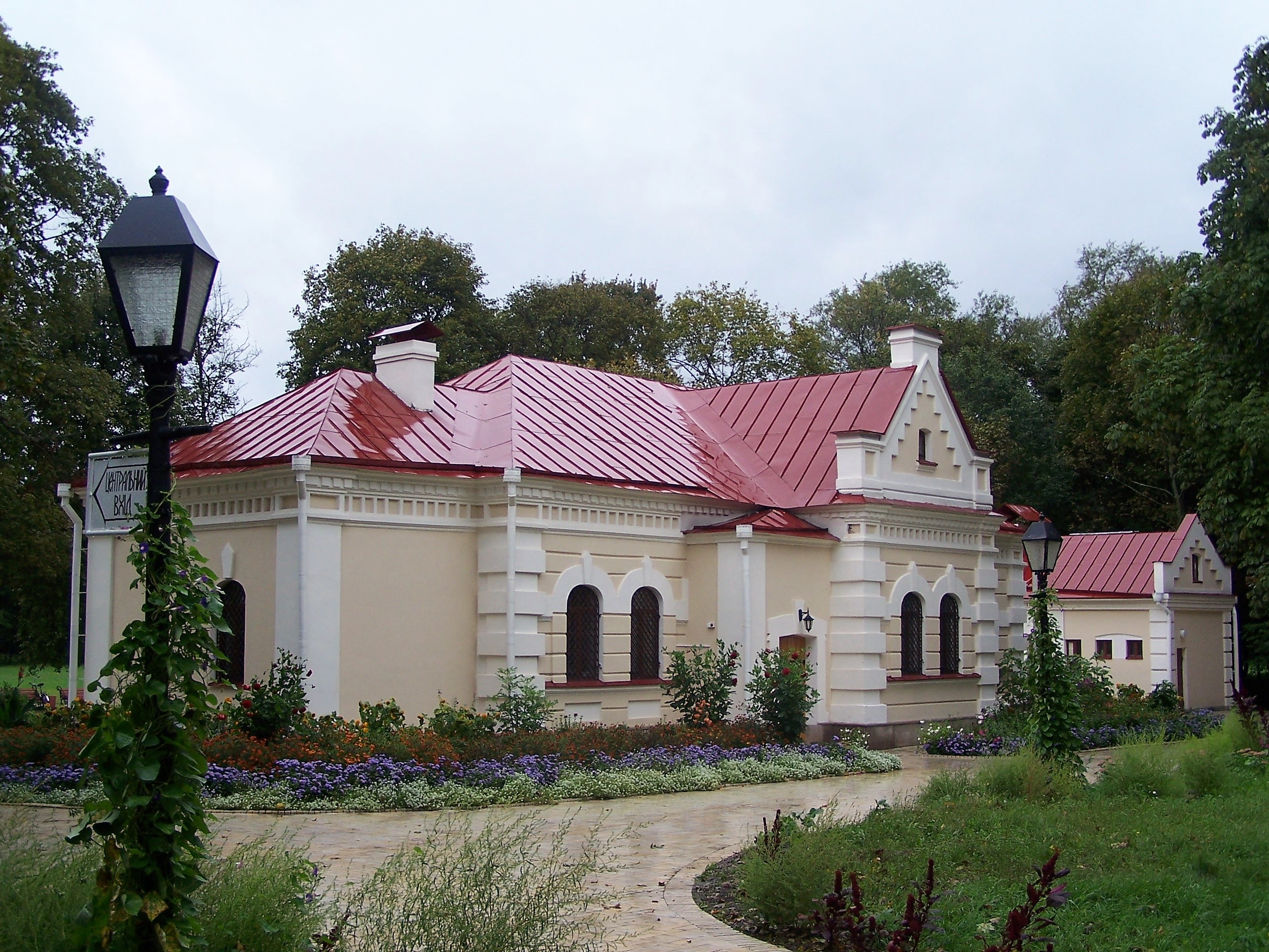 Музей Будинок Кочубея